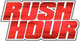 Rush Hour (Film) Logo